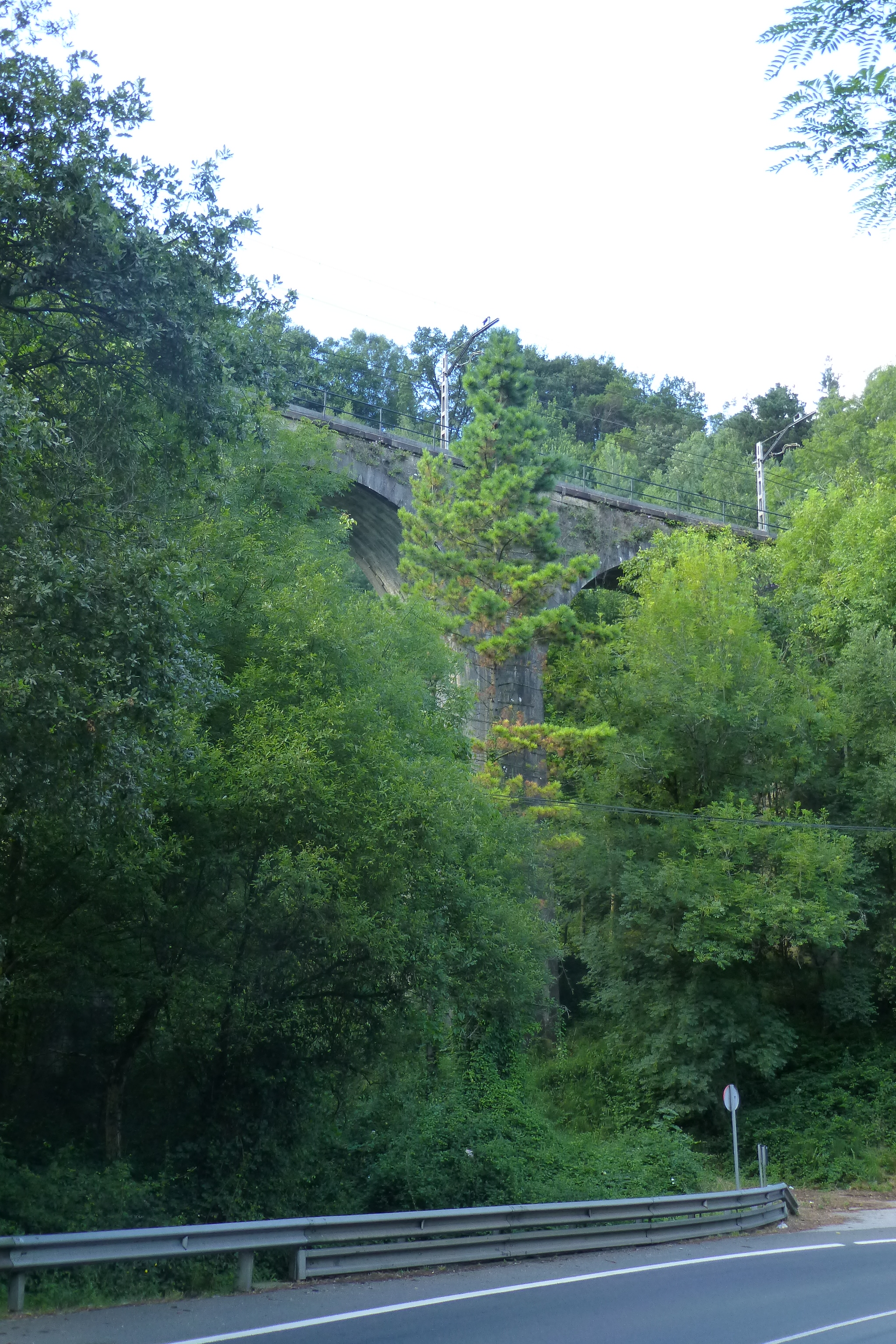 Viaducto de Torrebarria, oblicuo y de cinco arcos cuya máxima altura es de 27 metros por 2 de luz. Perteneciente a la línea férrea Amorebieta-Bermeo en Bizkaia, País Vasco, España.